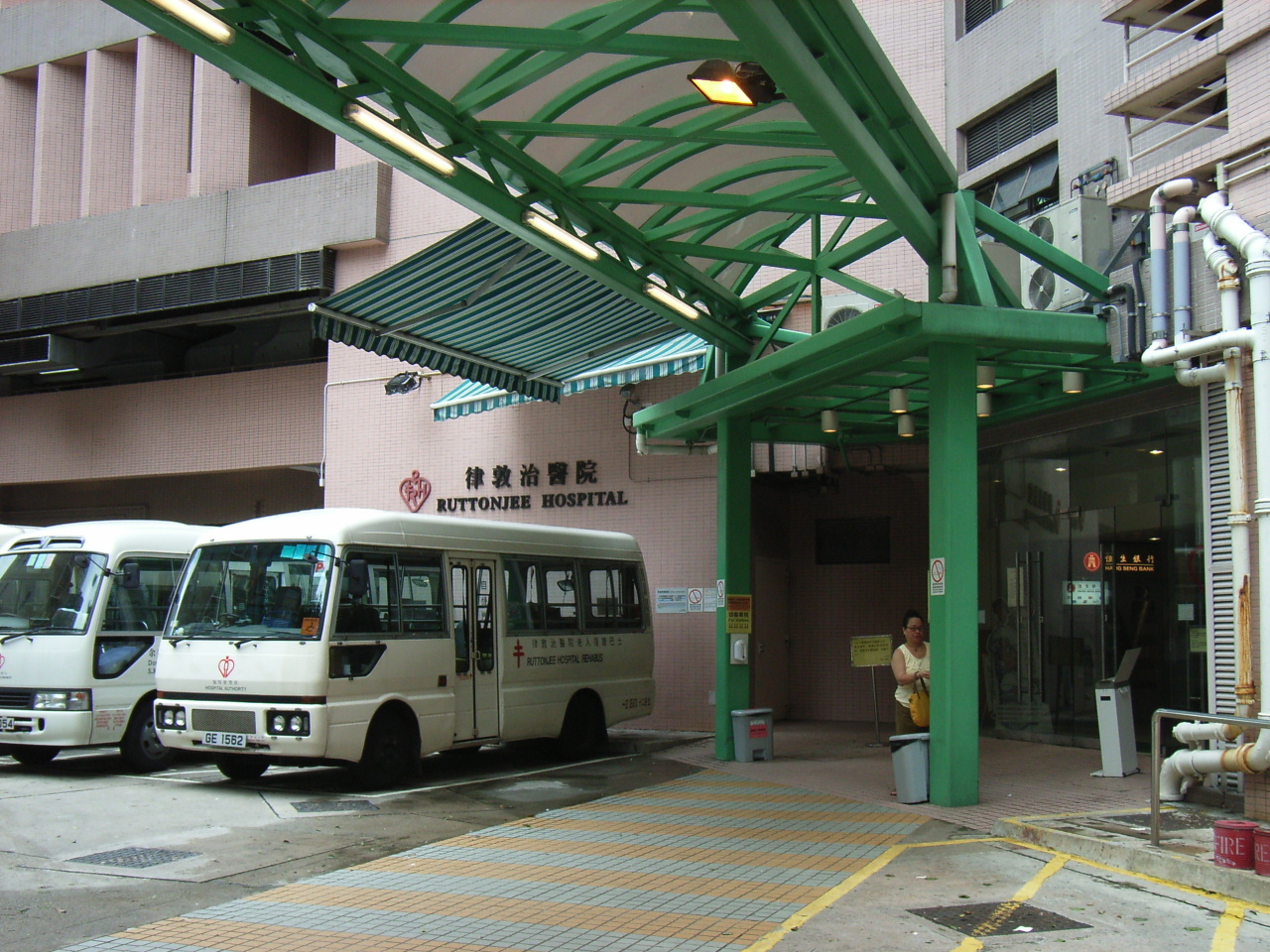 律敦治醫院 Ruttonjee Hospital BY RICHARD MARTIN.